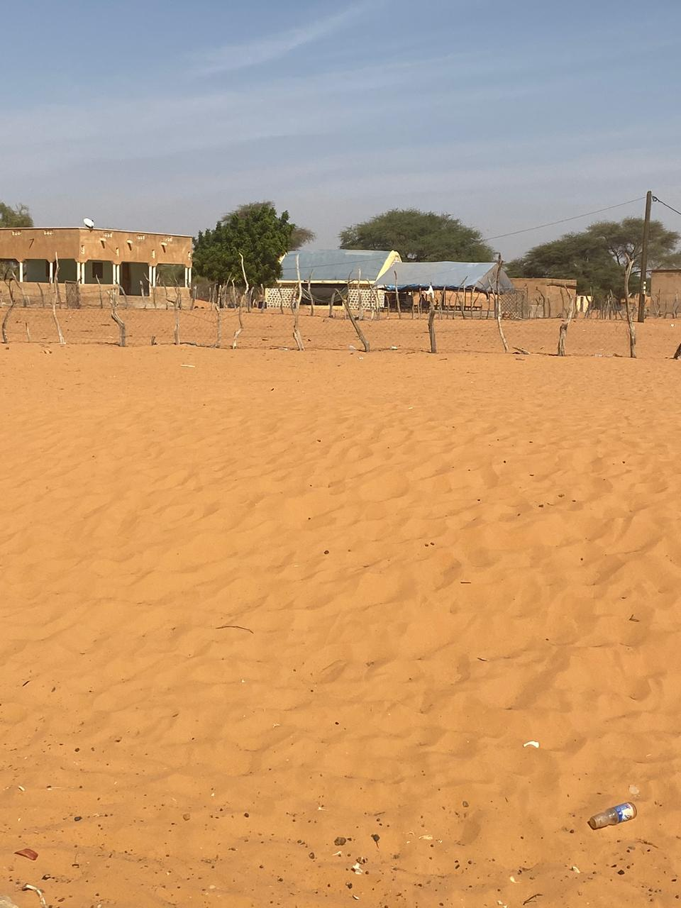 صورة لقرية الريان في موريتانيا